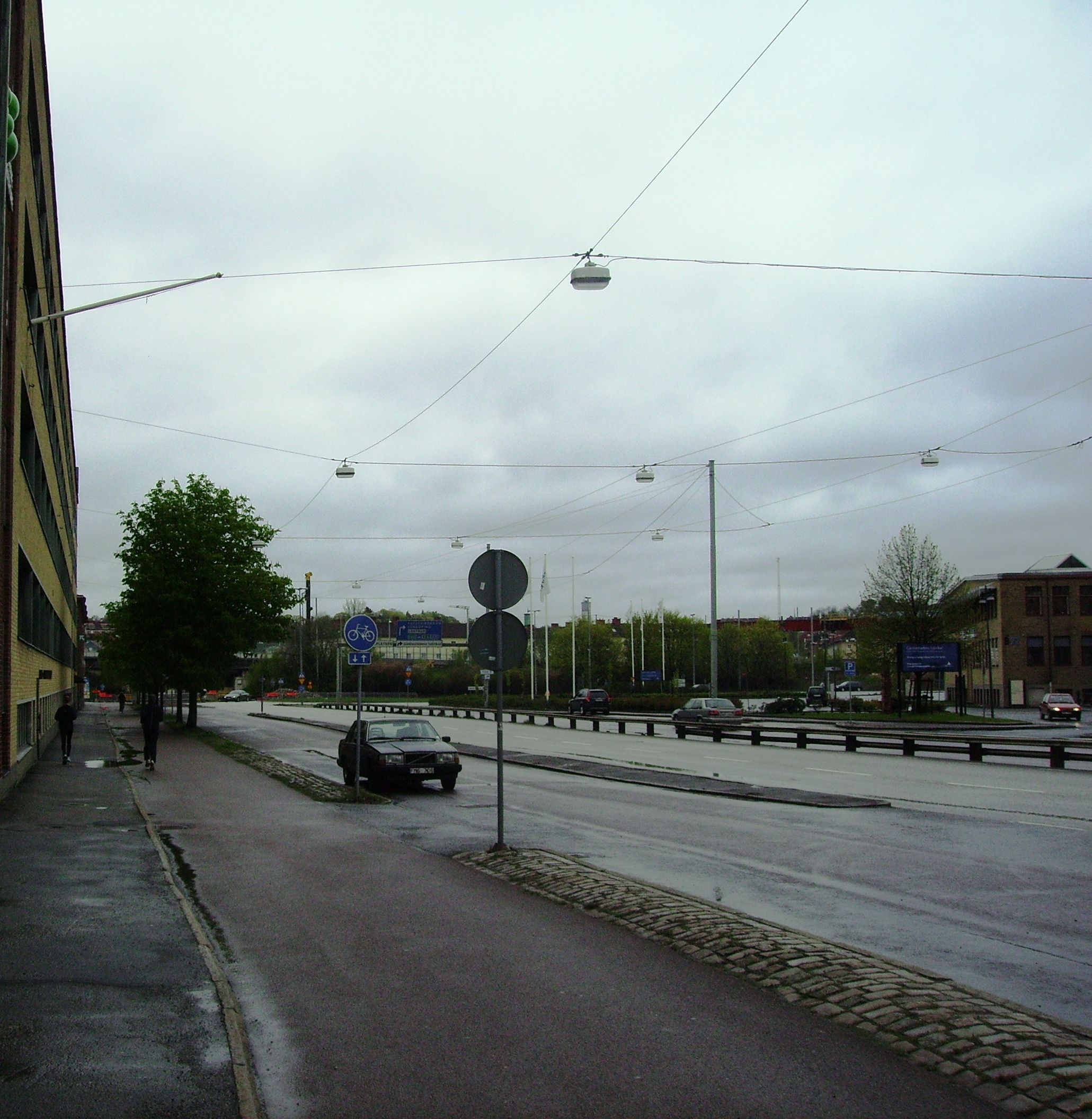 Picture of Gamlestadsvägen in Gamlestaden in Gothenburg.